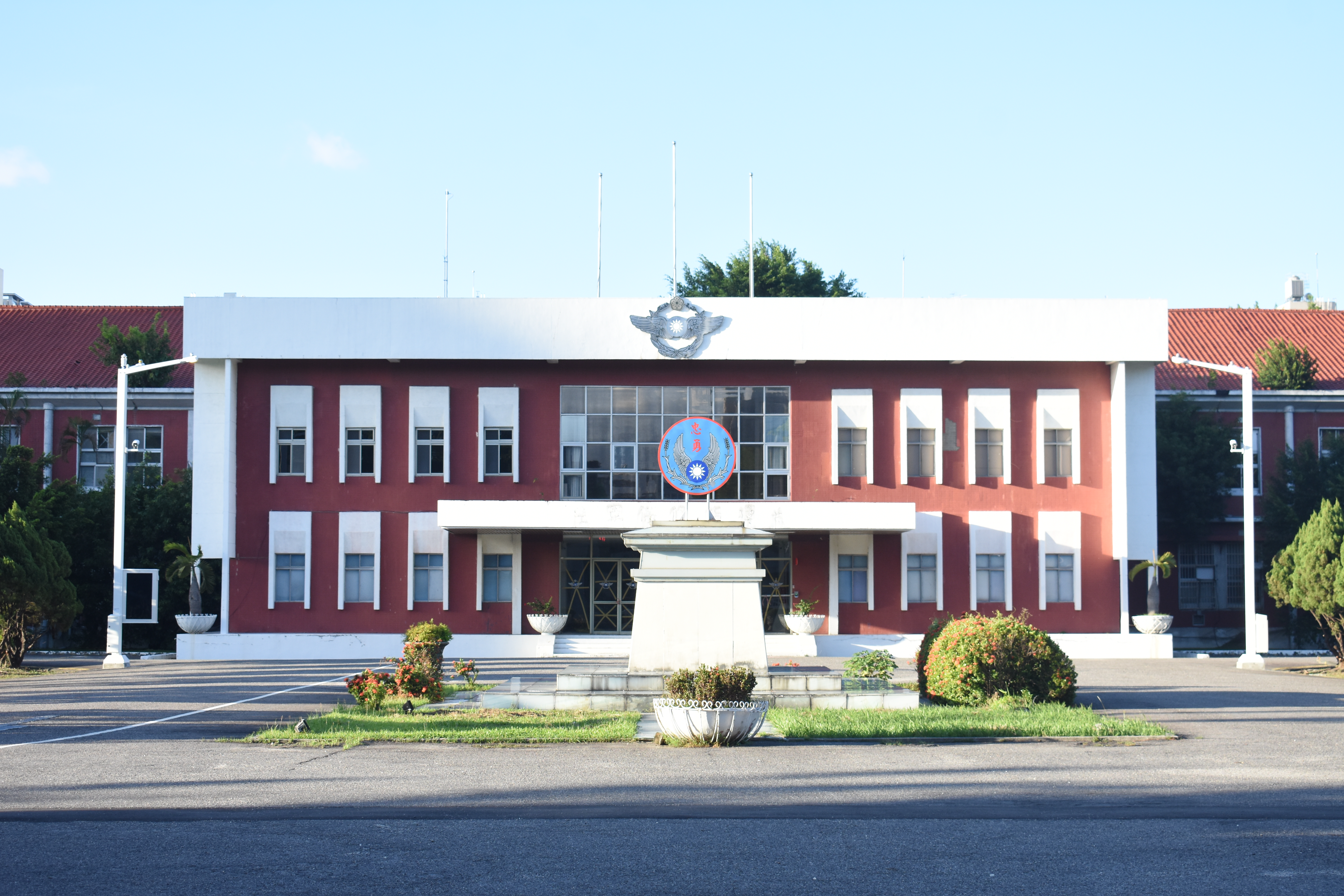 空軍總司令部舊址